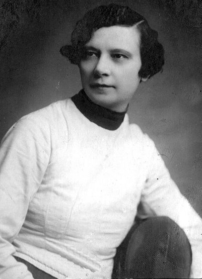 Tary Gizella magyar színésznő, tőrvívó, olimpikon, írónő, edző.